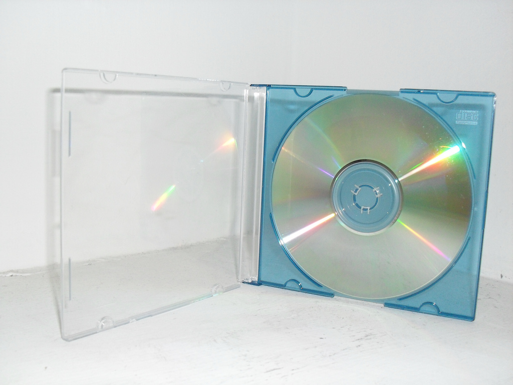 CD-ROM - disco cubierto de plastico sobre cuya superficie se graba la información que se lee de forma óptica